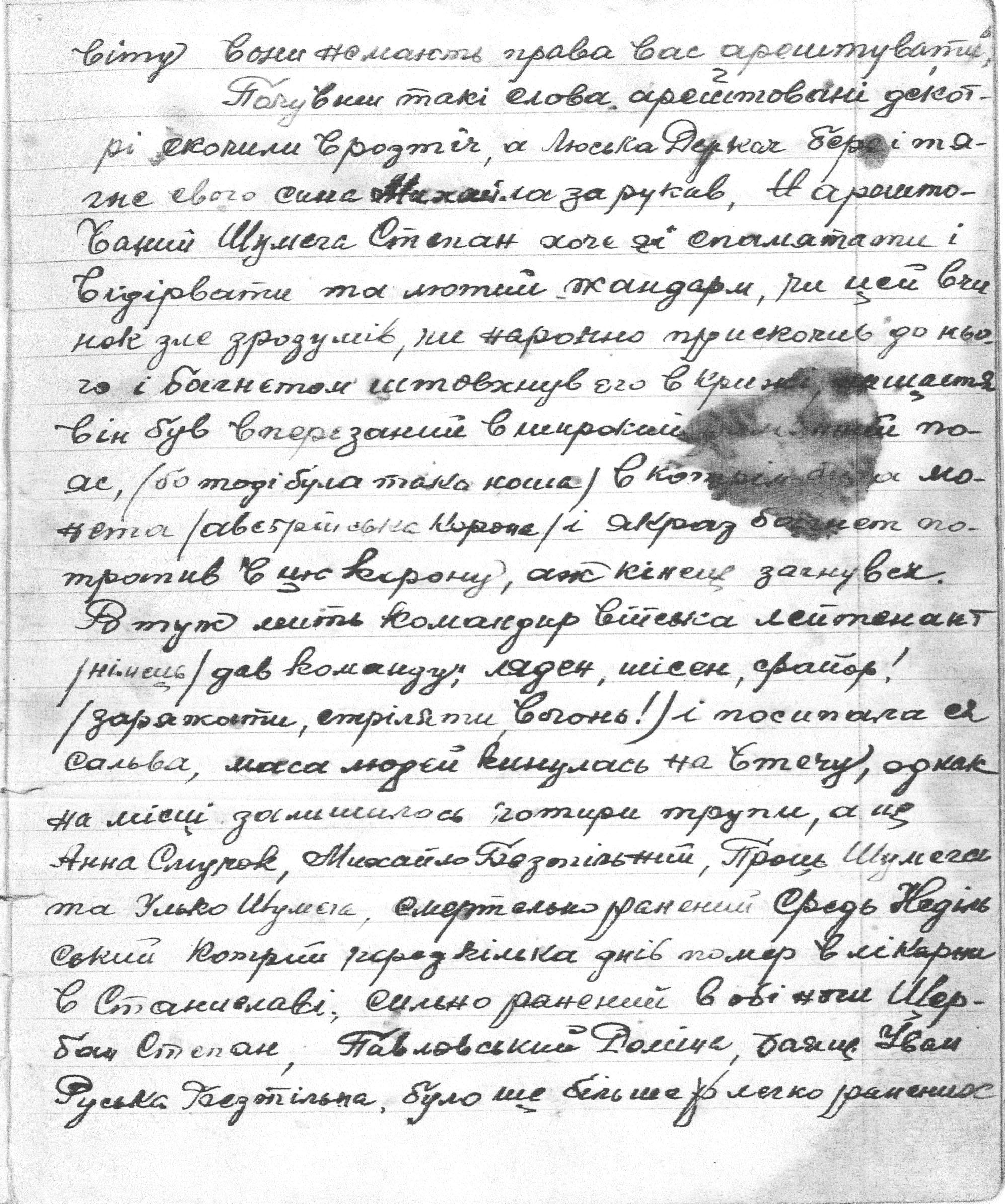 Копія рукопису